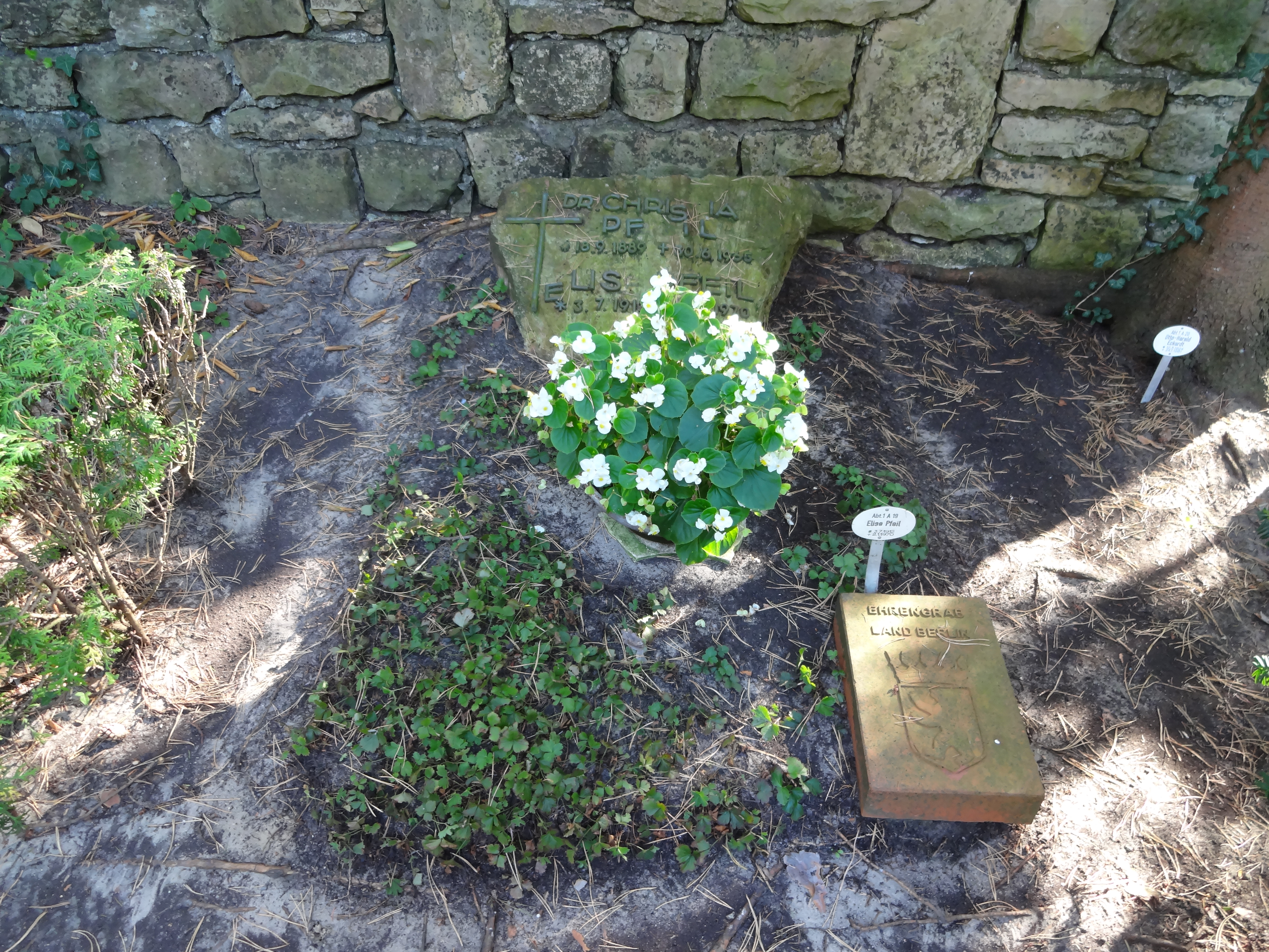 Ehrengrab von Pfeil, Christian auf dem Waldfriedhof Dahlem, der Friedhof ist als Gartendenkmal der Stadt Berlin (Nr. 09045949)This is a photograph of an architectural monument.